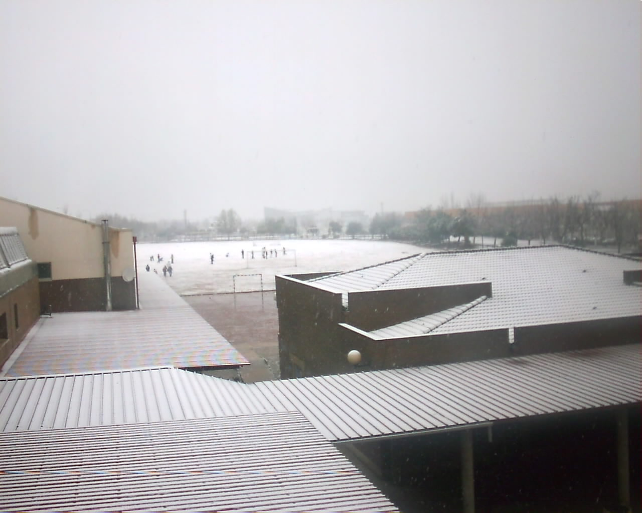 Nieve sobre el IES Cuatro Caminos, Don Benito.